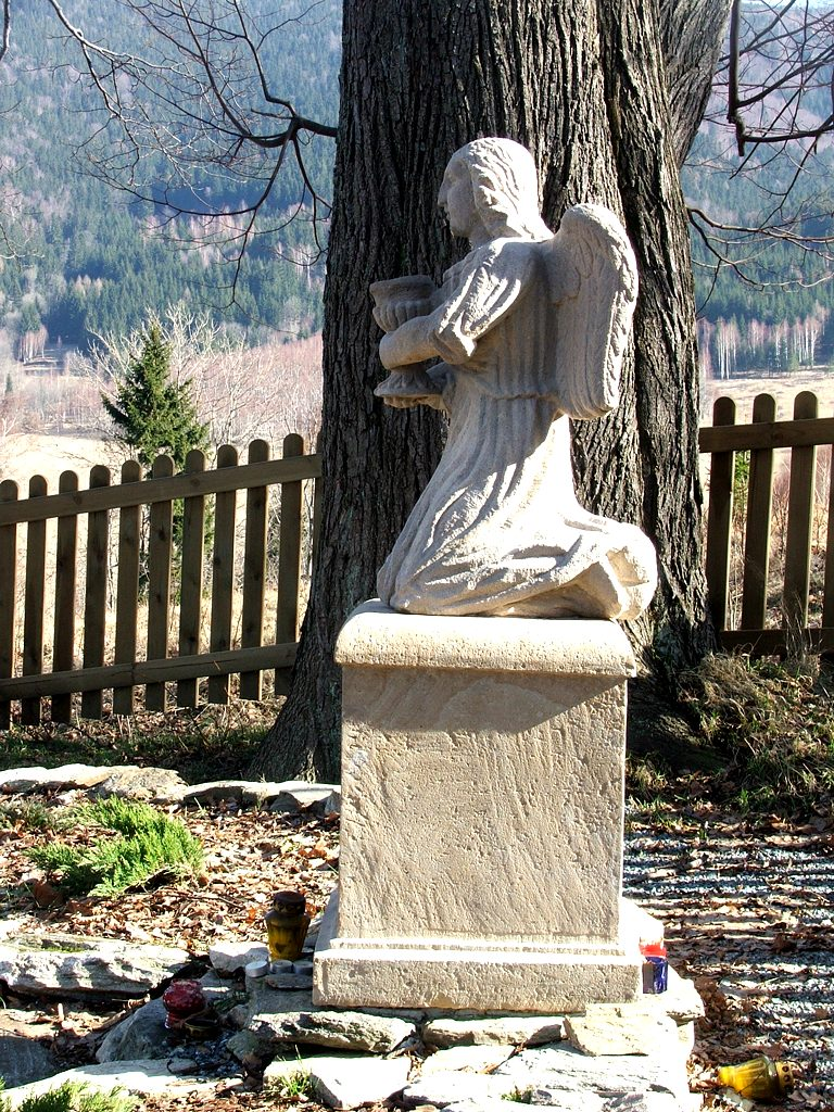 Góra Oliwna w Bolesławowie (Dolny Śląsk, Polska) – anioł